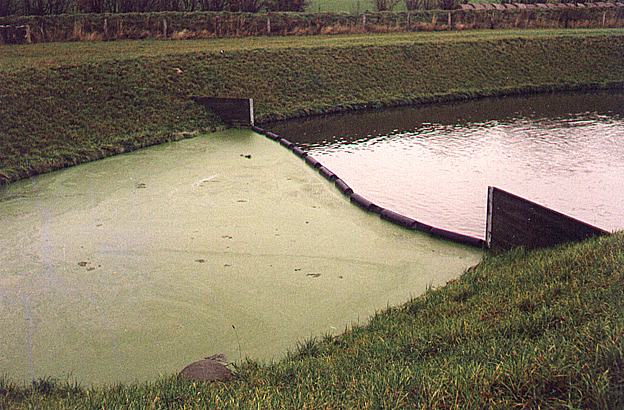 Schwimmende Tauchwand mit Uferbefestigung aus Holz